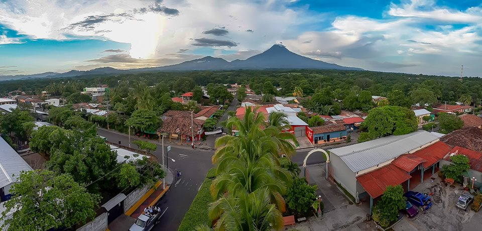 Vista panoramica